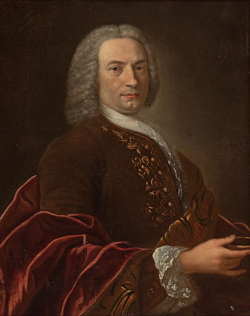 Depicted person: Giovanni Domenico Olivieri